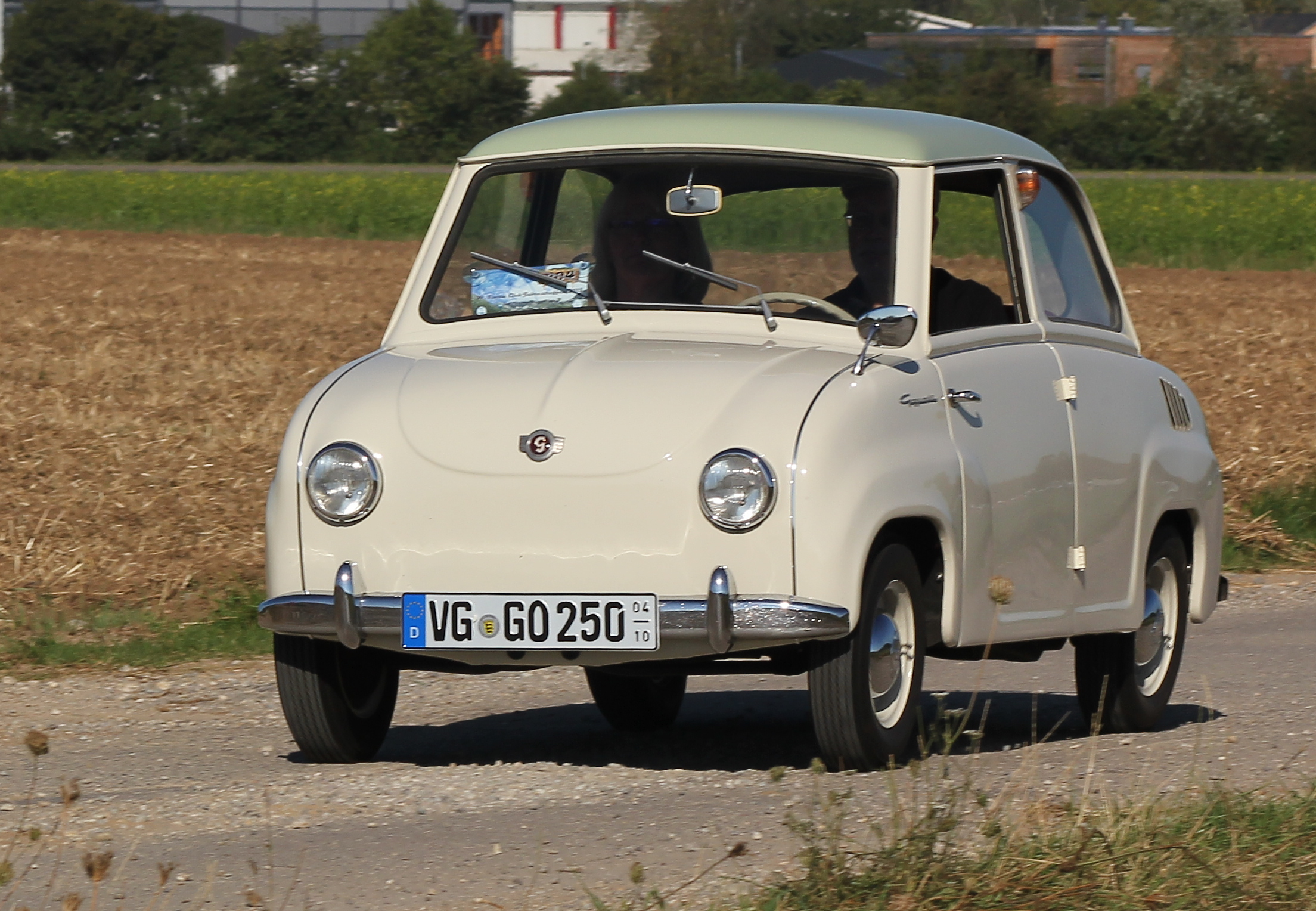 Goggomobil, Ausführung 1957 bis 1963, noch mit hinten angeschlagenen Türen. Das Auto nahm als Gast am 39. Isetta-Treffen in Bad Wörishofen teil. (Kennzeichen des Fahrzeugs verändert)